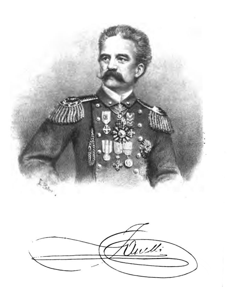 Giovanni Battista Janelli (1819-1884), con autografo